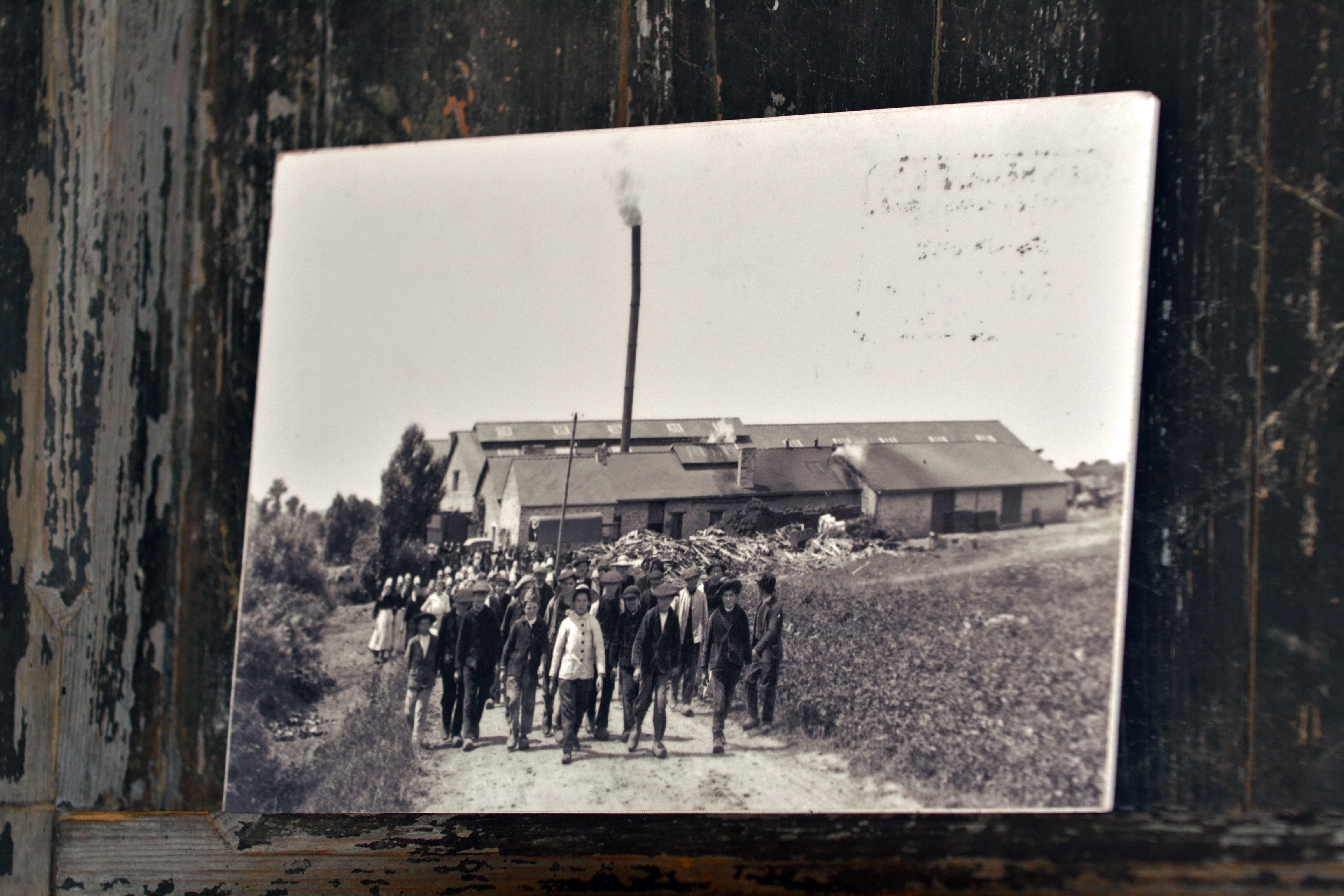 Exposition sur l'histoire du Pâté Hénaff dans le musée de la marque à Pouldreuzic.